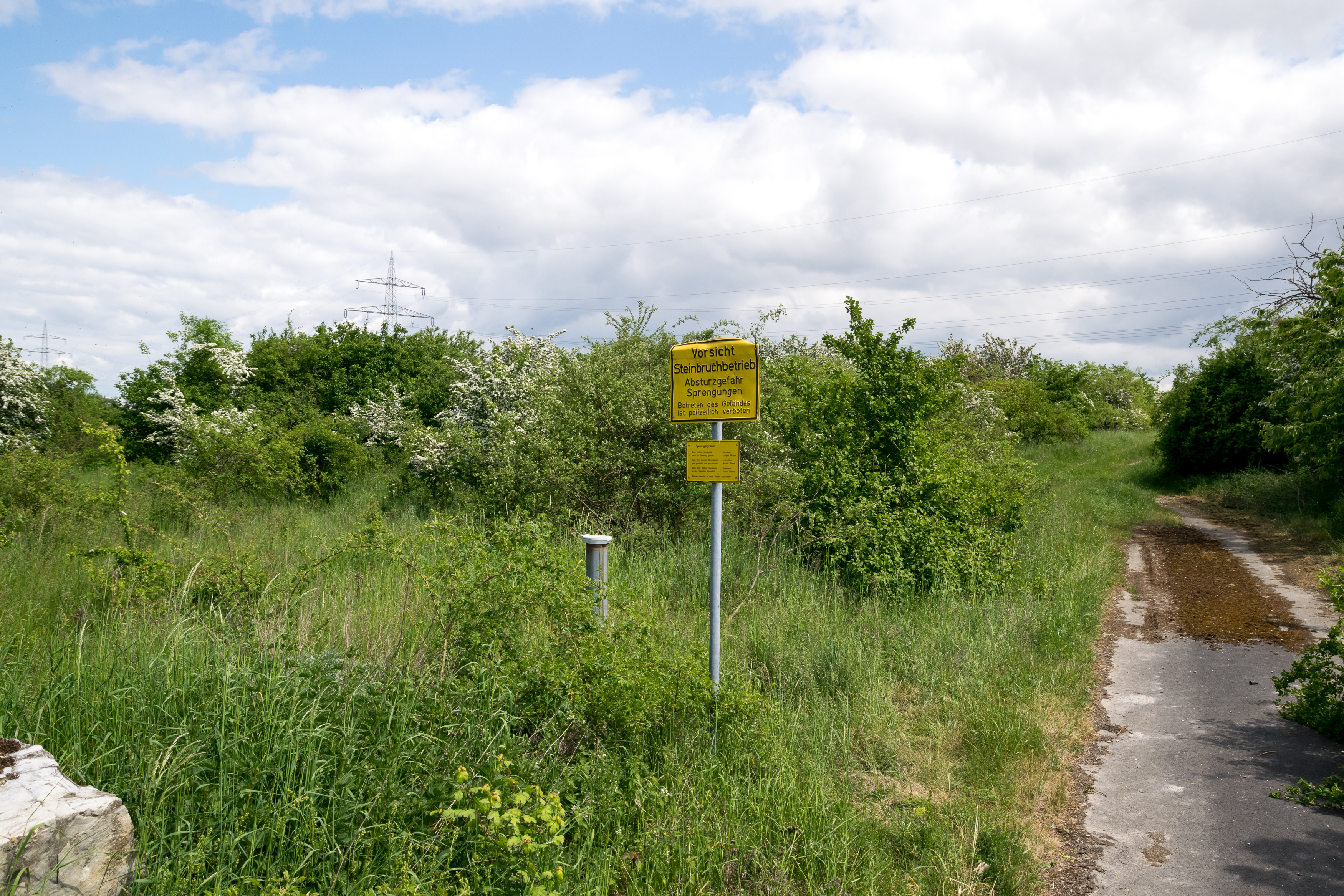 Naturschutzgebiet Steinbruch Ilse, Paderborn, Kreis Paderborn